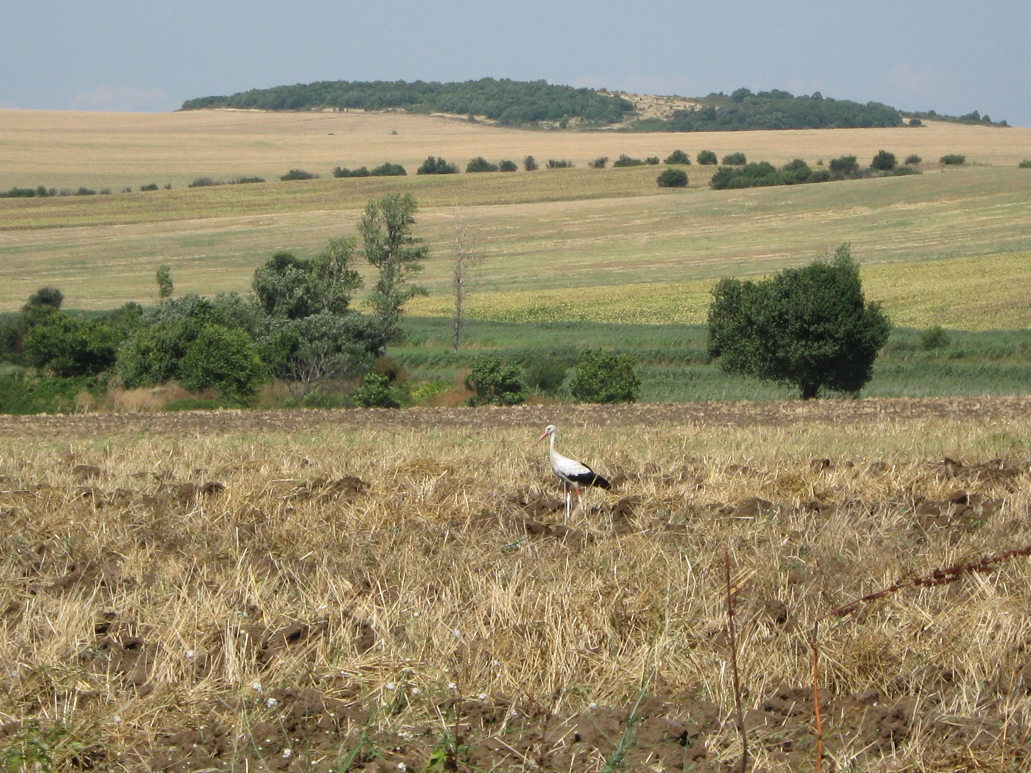 Околностите на село Горан, България